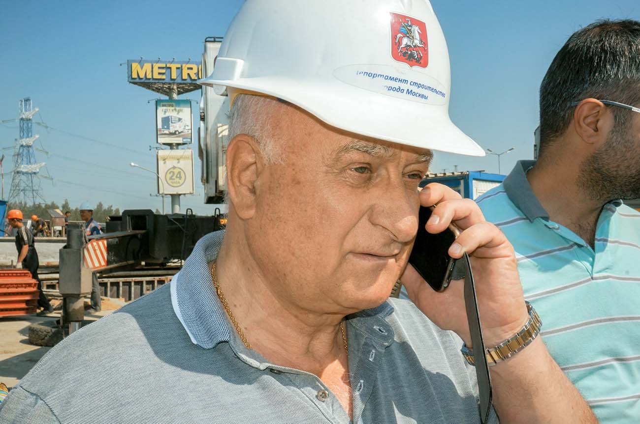 Аксёнов Пётр Николаевич на строительном объекте